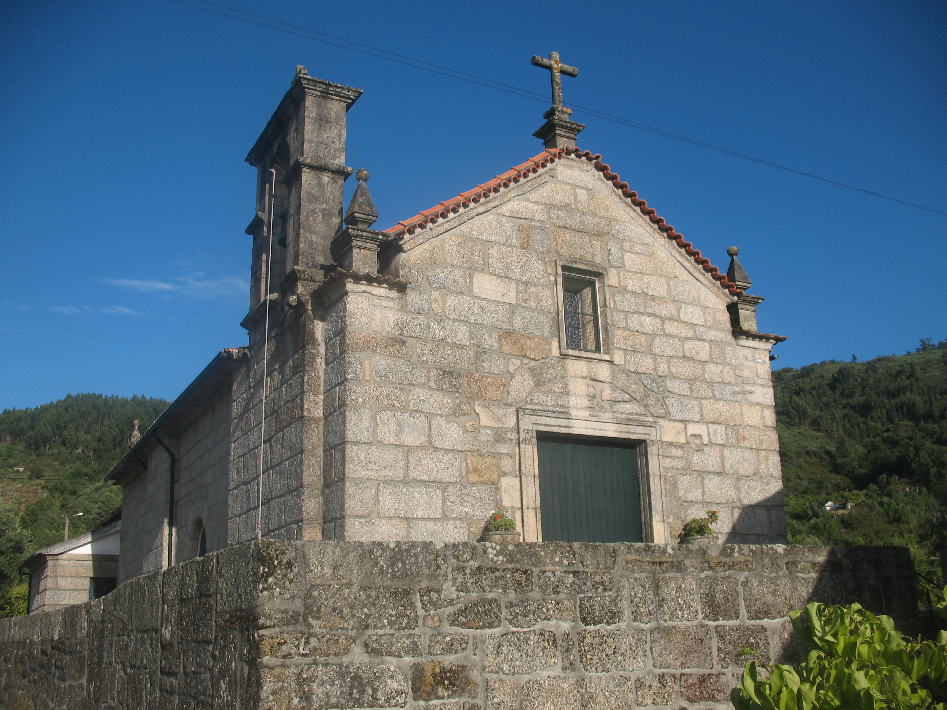 Amarante